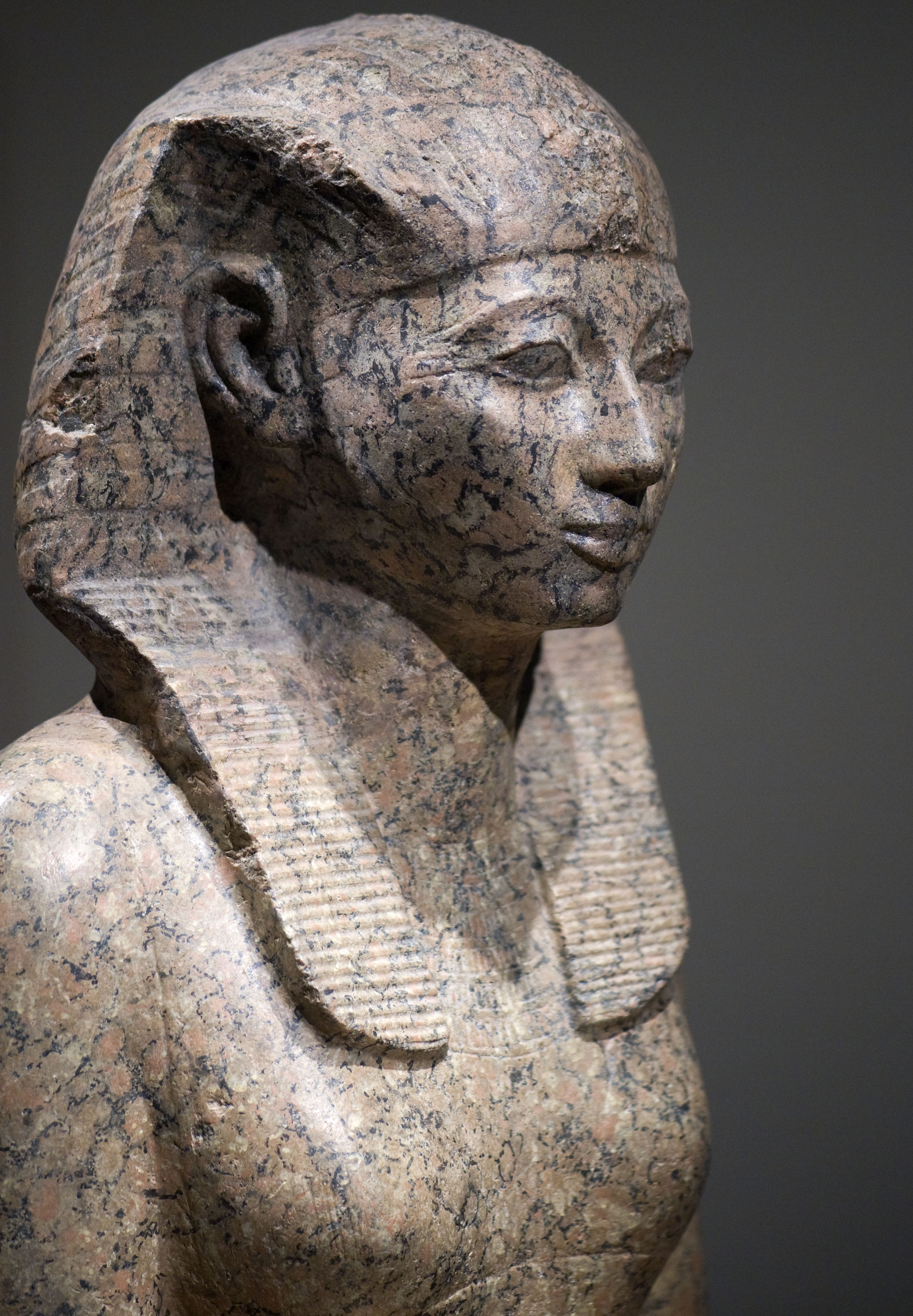 Beeld van koningin Hatsjepsoet Maat-ka-Re Hatsjepsoet (RMO Leiden)